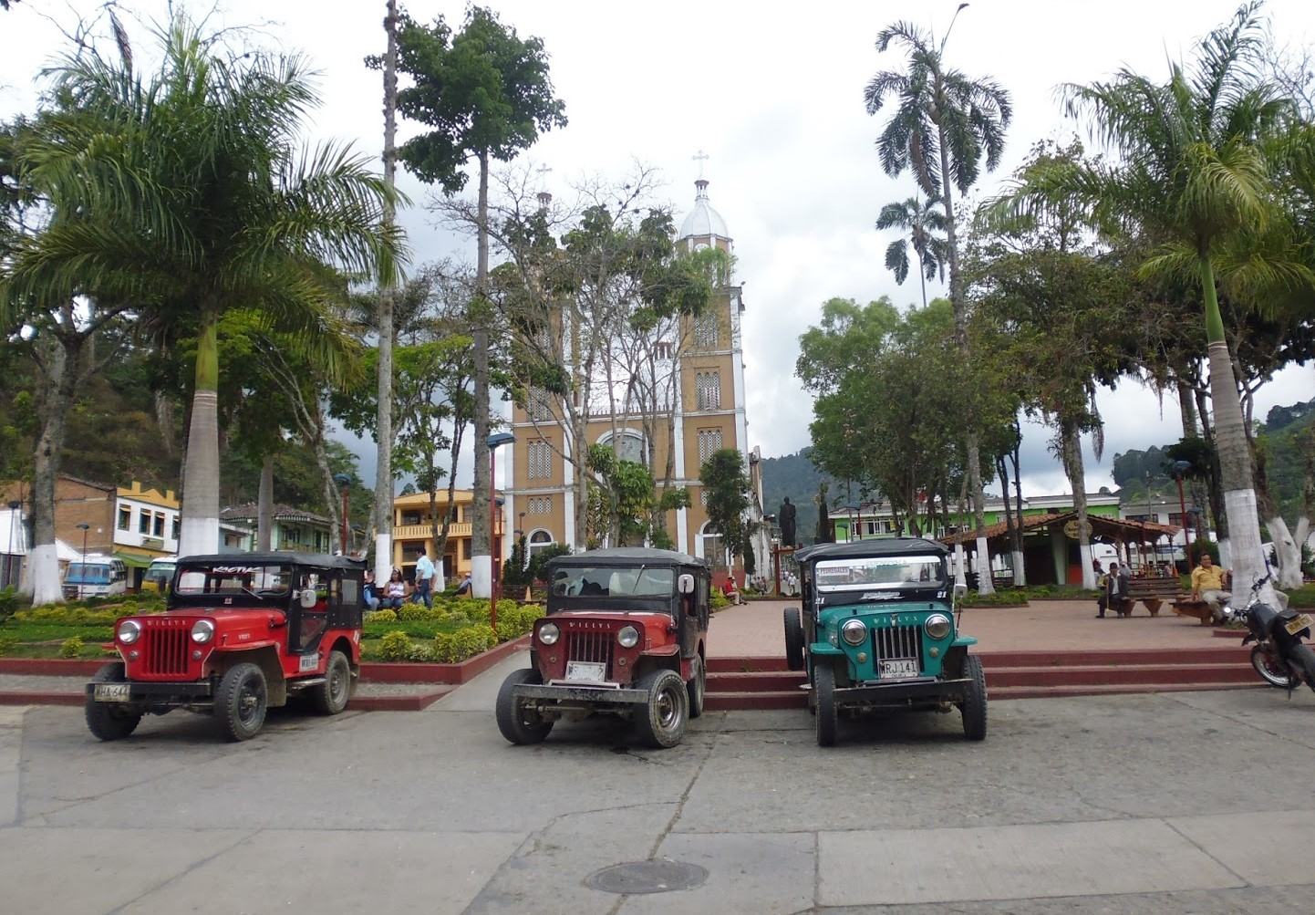 Plaza Principal Genova Quindio Colombia